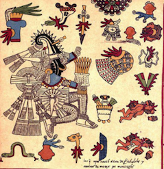 Itztlacoliuhqui en el Códice Borbónico en la página 12